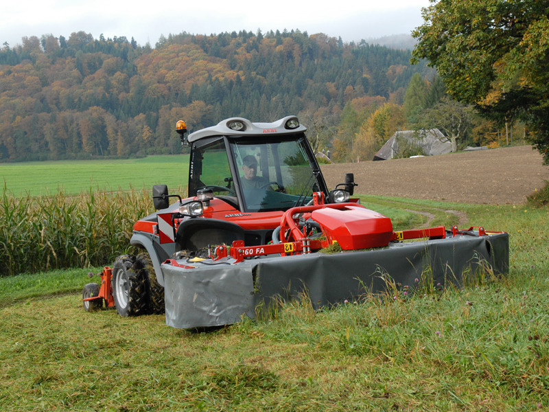 Aebi TT211